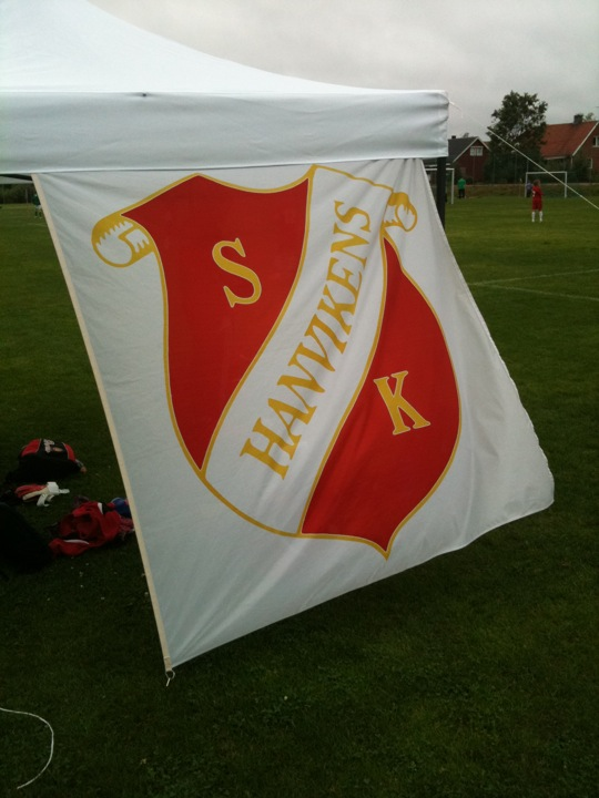 Hanvikens SK officiella flagga som underlag till artikel om Hanvikens SK på Wikipedia